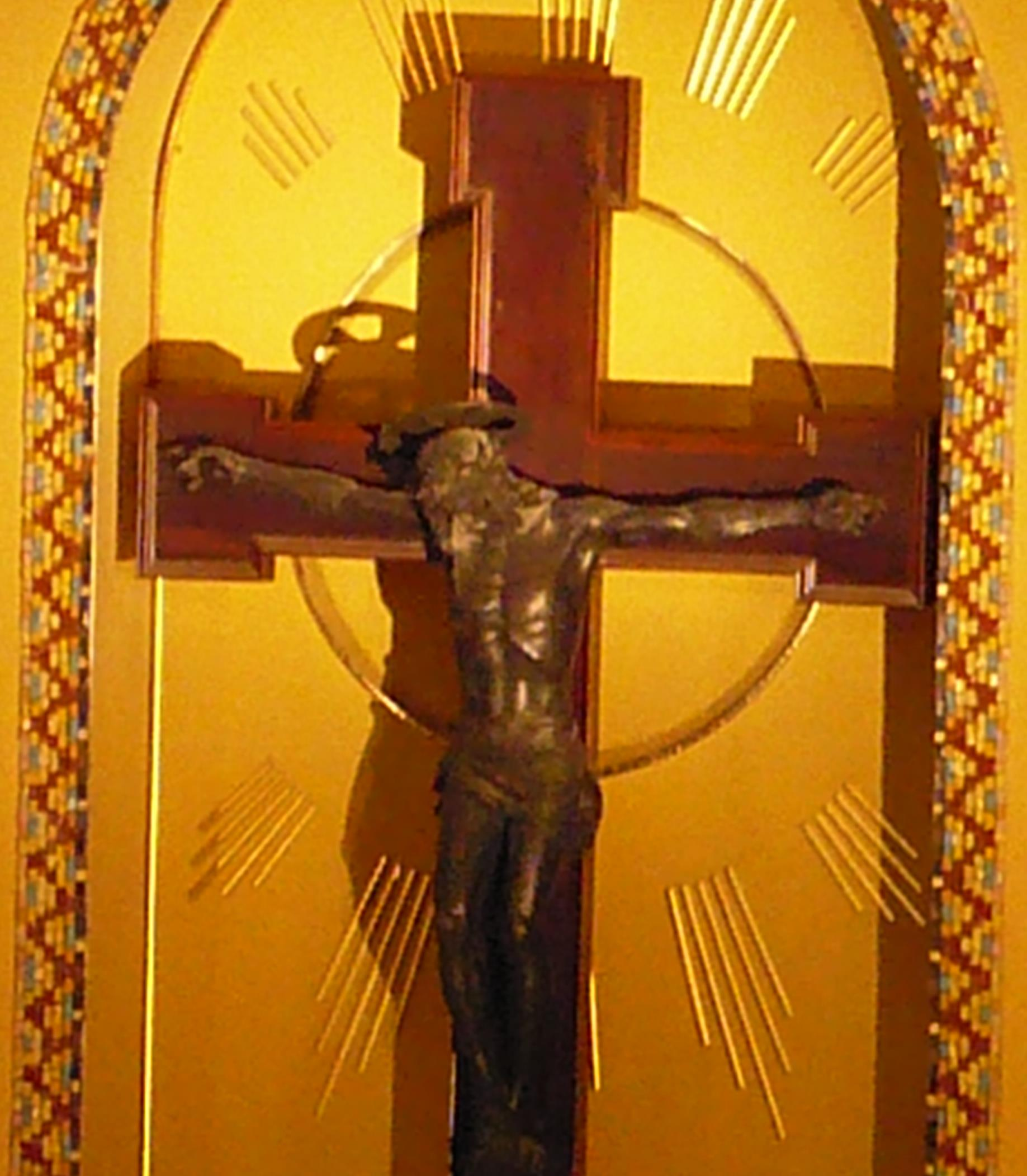 Crocifisso in bronzo donato da Michele Tripisciano in punto di morte, alla chiesa di Santa Lucia, santa cui era devoto, per aver riacquistato la vista da ragazzino dopo un periodo di cecità.